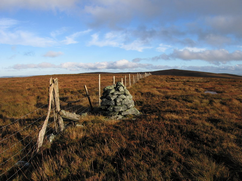 Waun Garnedd-y-filiast (left) and Carnedd y Filiast (right) from the summit of Carnedd Llechwedd-llyfn